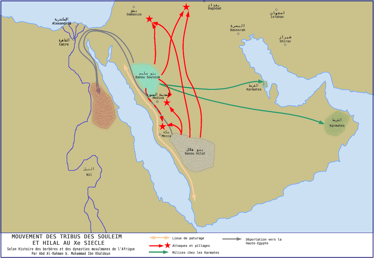 Mouvement des Tribus de Souleim et Hilal D'aprés l'Histoire des Berbères et des dynasties musulmanes de l'Afrique Par Abd al-Rahman b. Muhammad Ibn Khaldoun